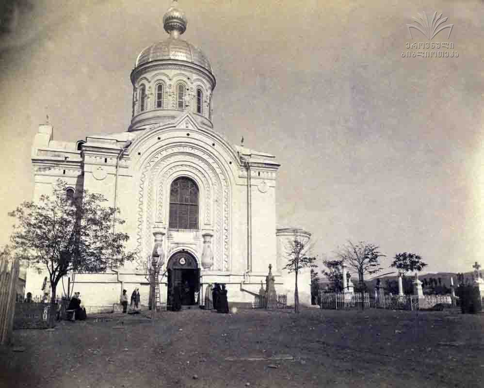 დიდუბის ღვთისმშობლის ეკლესია